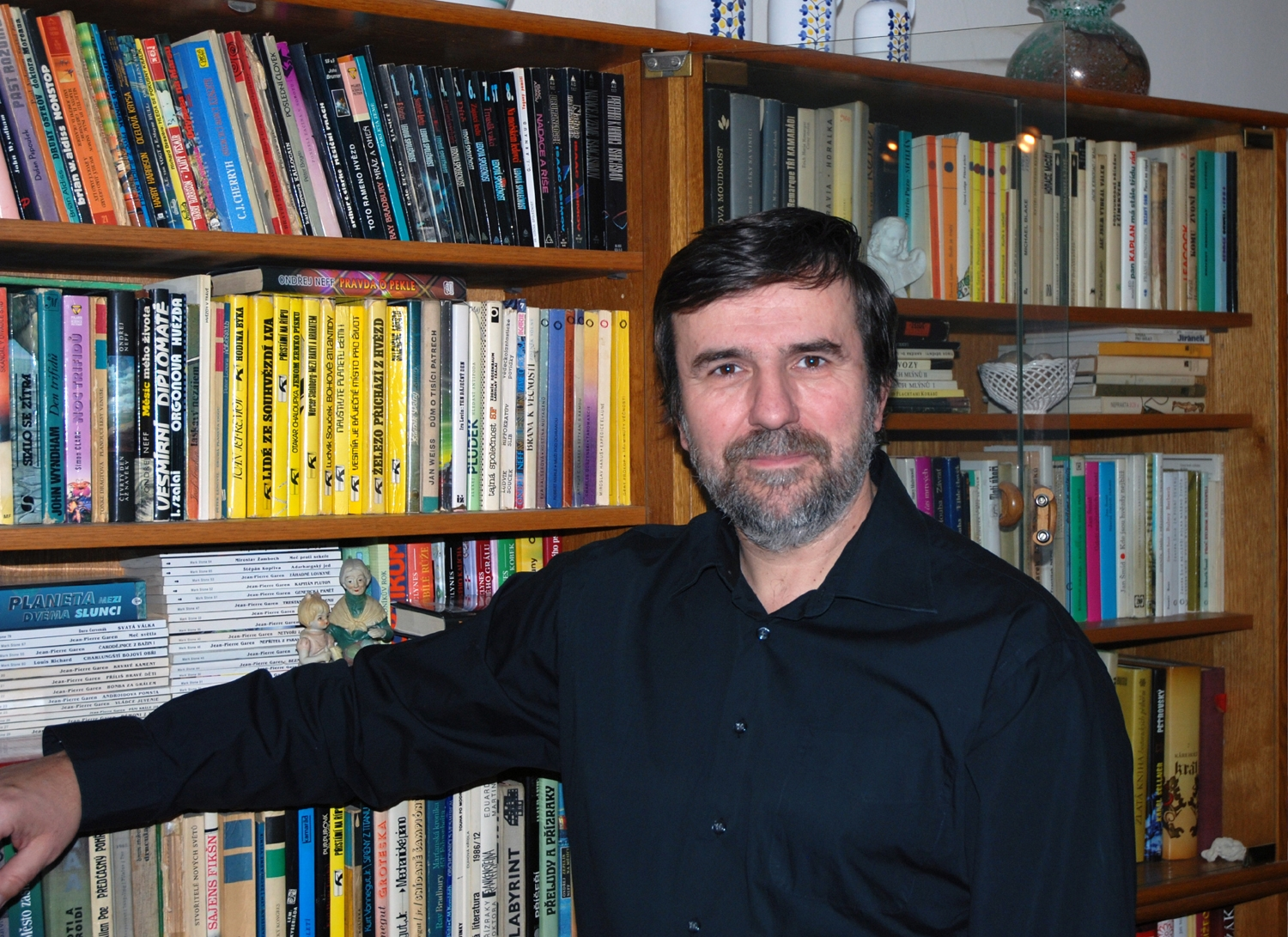 spisovatel Vlastimil Vondruška